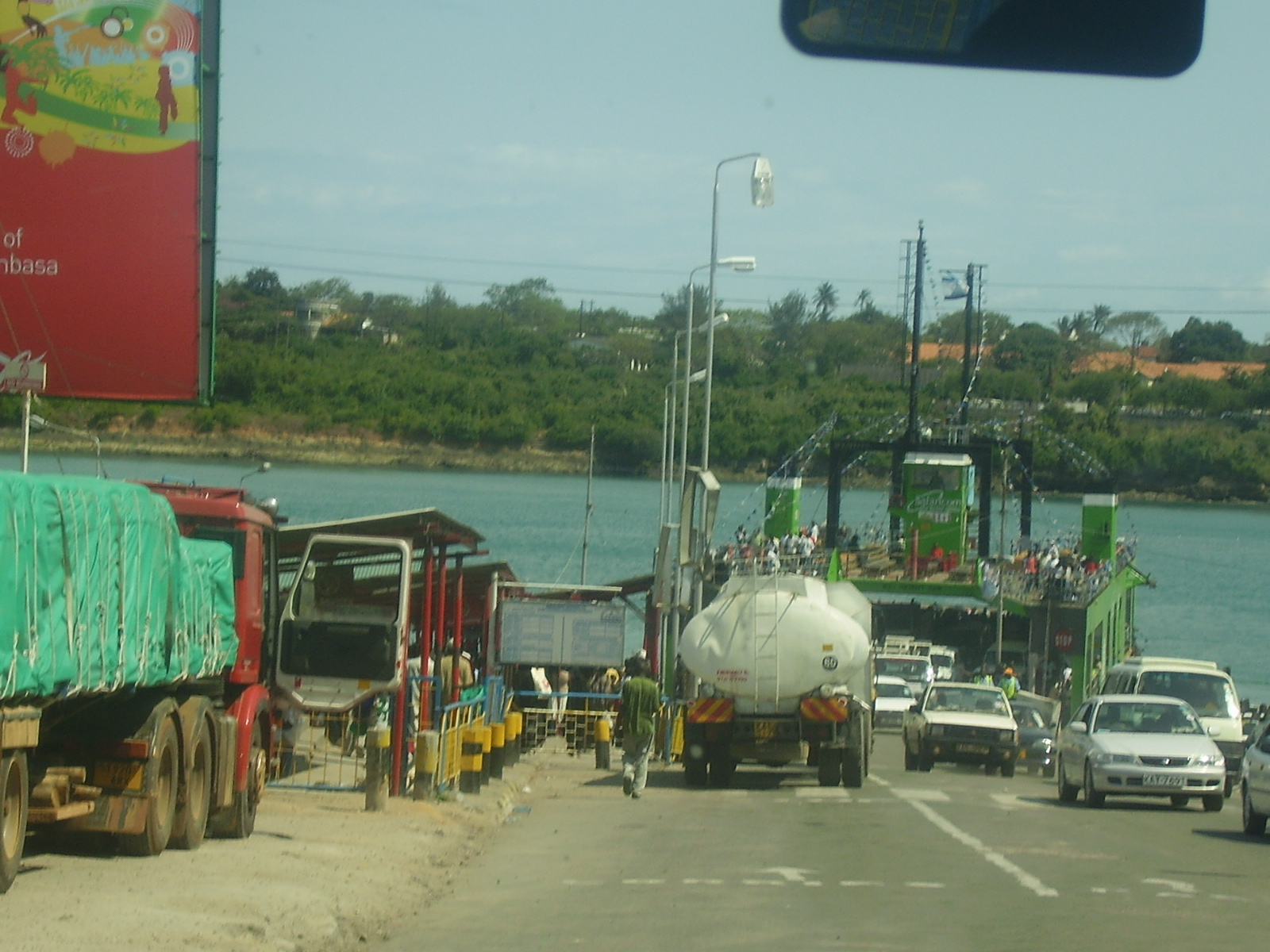 opera mia mia fotografia scattata il 16 agosto 2007 a Mombasa al traghetto